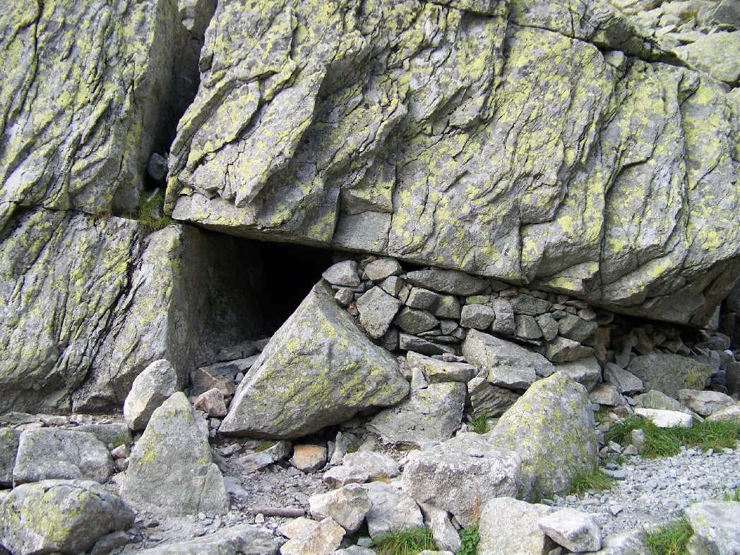 Koleba Przy Litworowym Stawie Białowodzkim